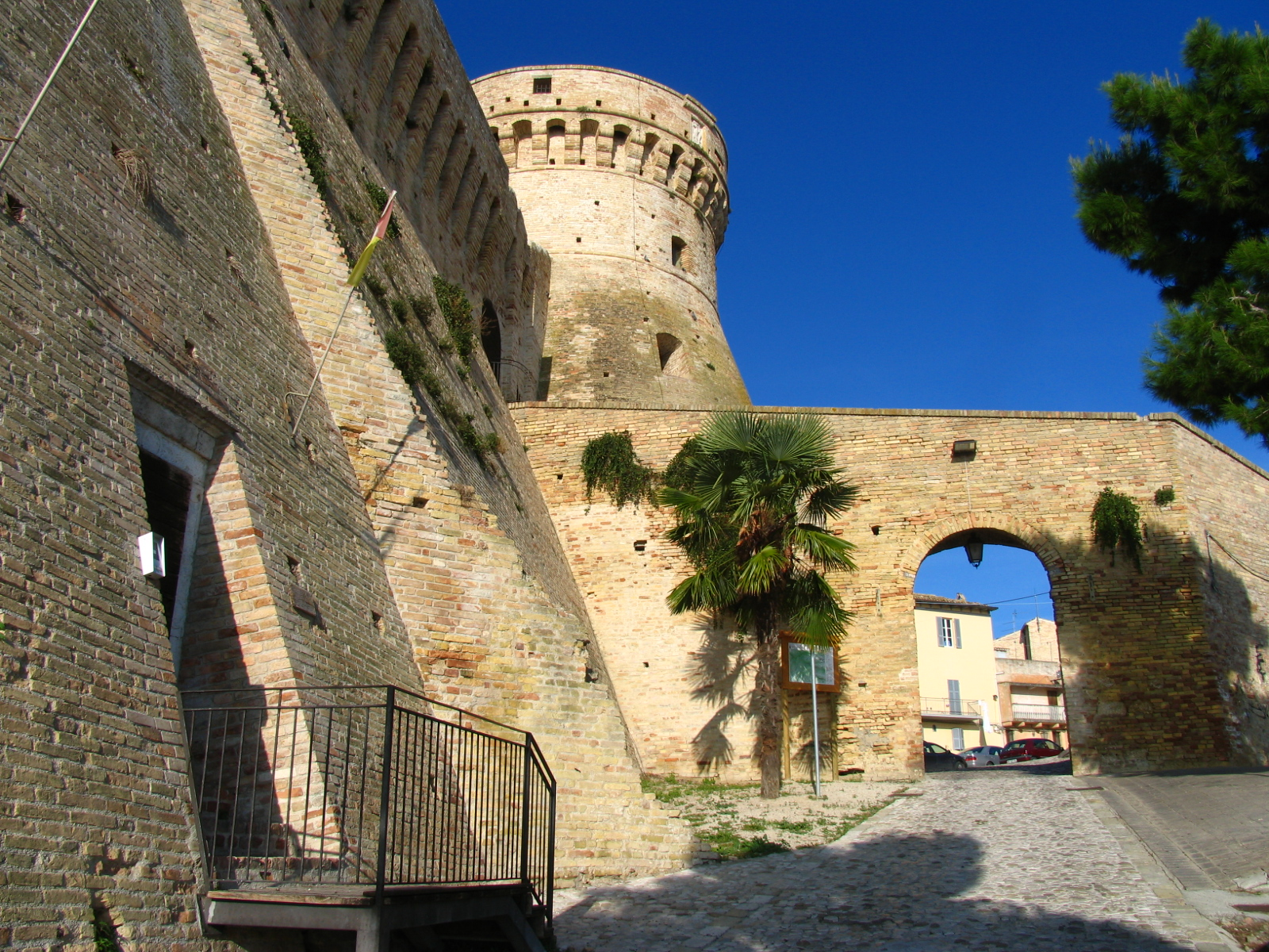 Acquaviva Picena, Marche, ItaliaFortezza di Acquaviva Picena, Fortress of Acquaviva Picena Marche Italy